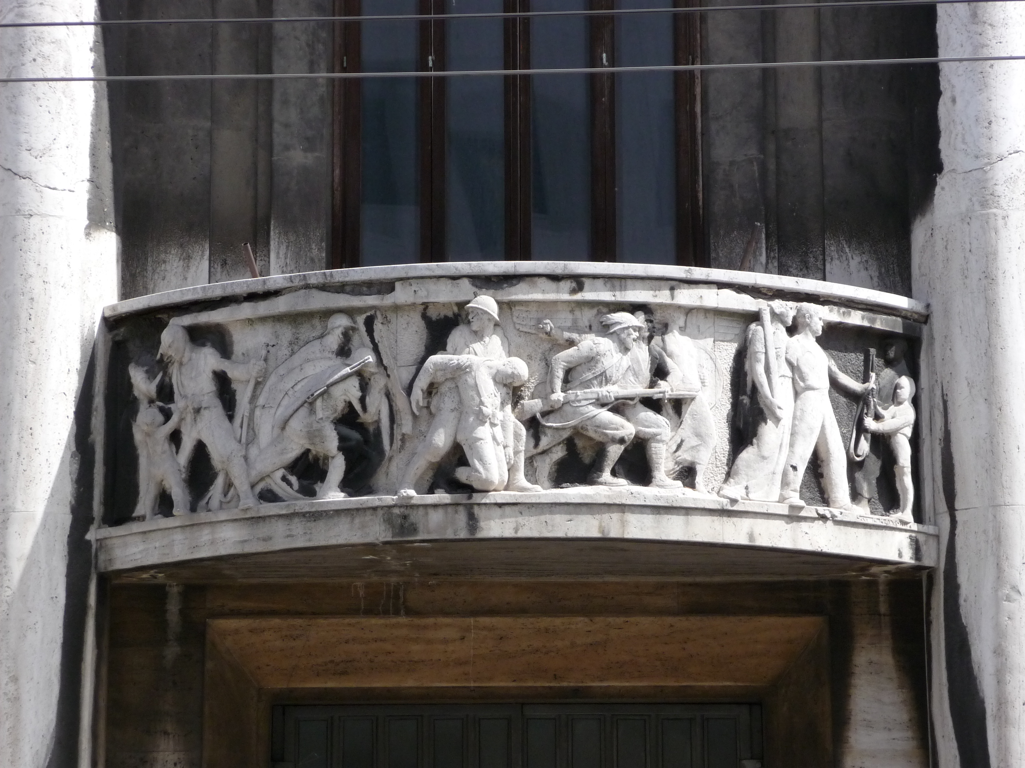 Palazzo del Mutilato - Ancona: Particolare Giovanni Mello Particolare del Palazzo del Mutilato di Ancona